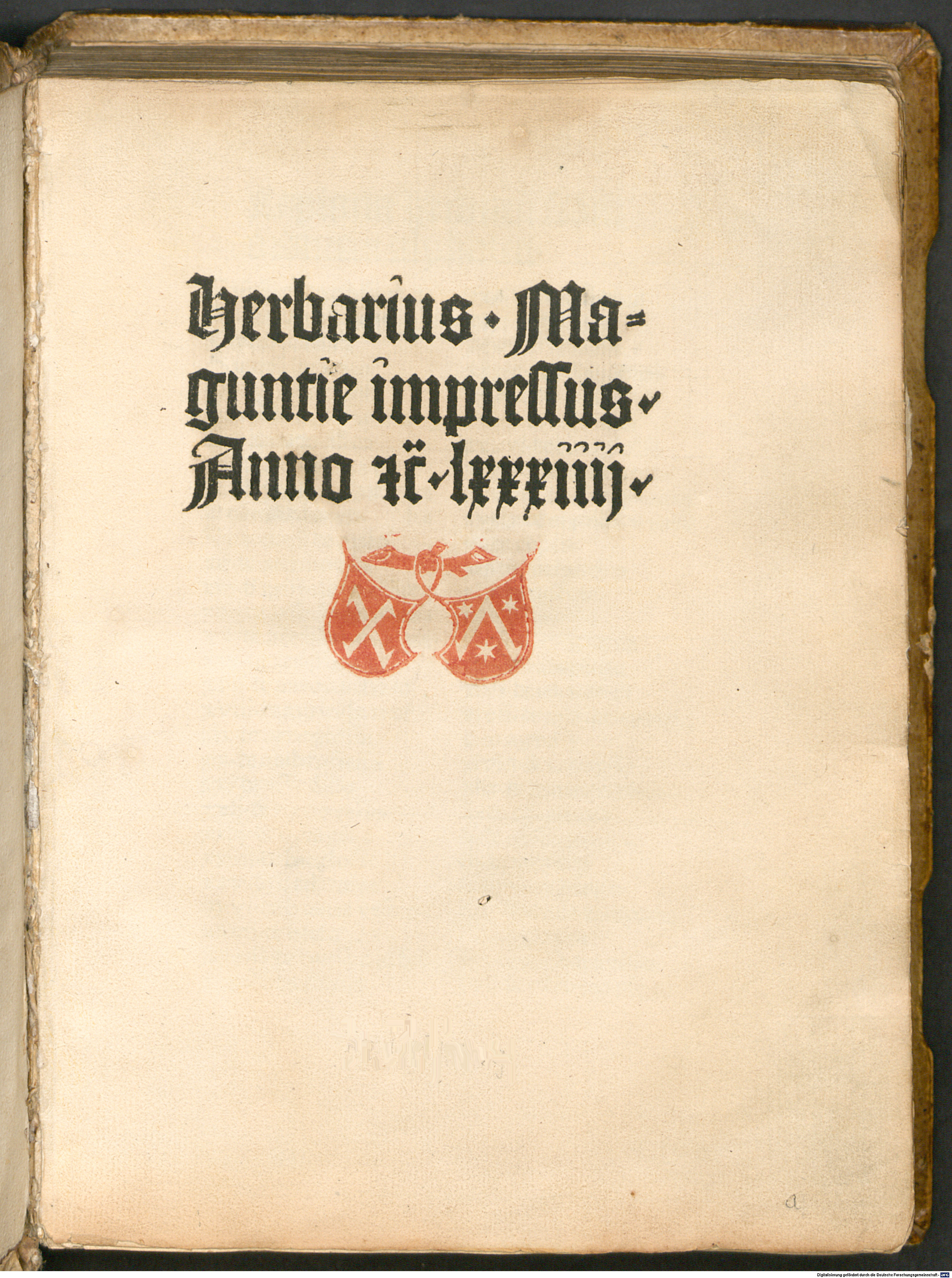 Titelblatt